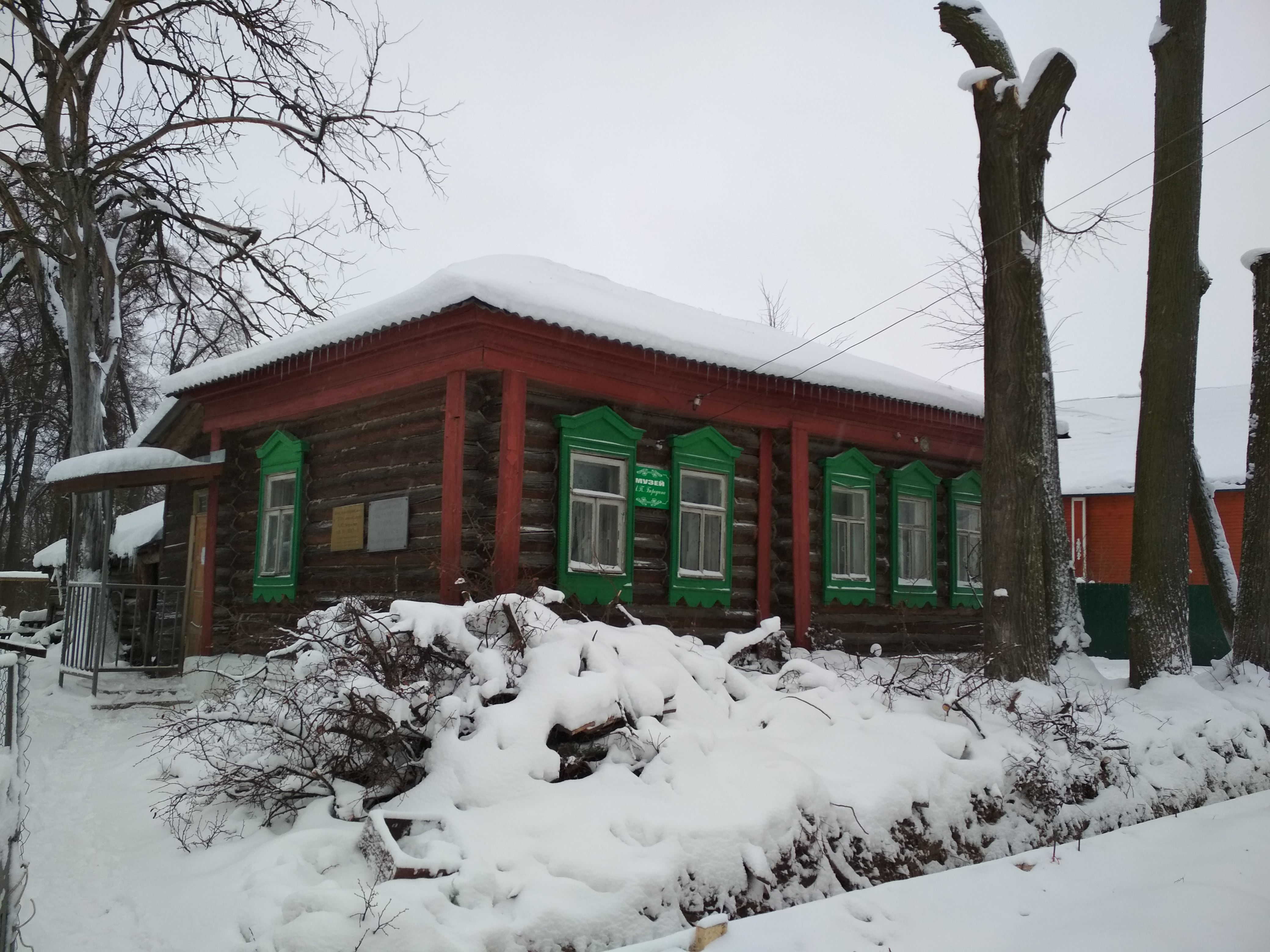 Дом-музей Александра Порфирьевича Бородина в Давыдове